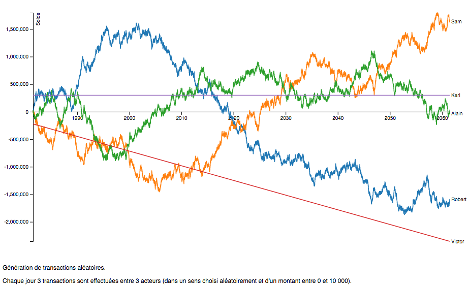 Simulation d'un échange entre 3 acteurs dans le cadre d'un crédit mutuel pendant 80ans. Chaque jour il y a 3 échanges entre 3 acteurs, dans un sens aléatoire et pour un montant entre 0 et 10 000. Les acteurs karl et victor sont juste des références mais n'interagissent pas.